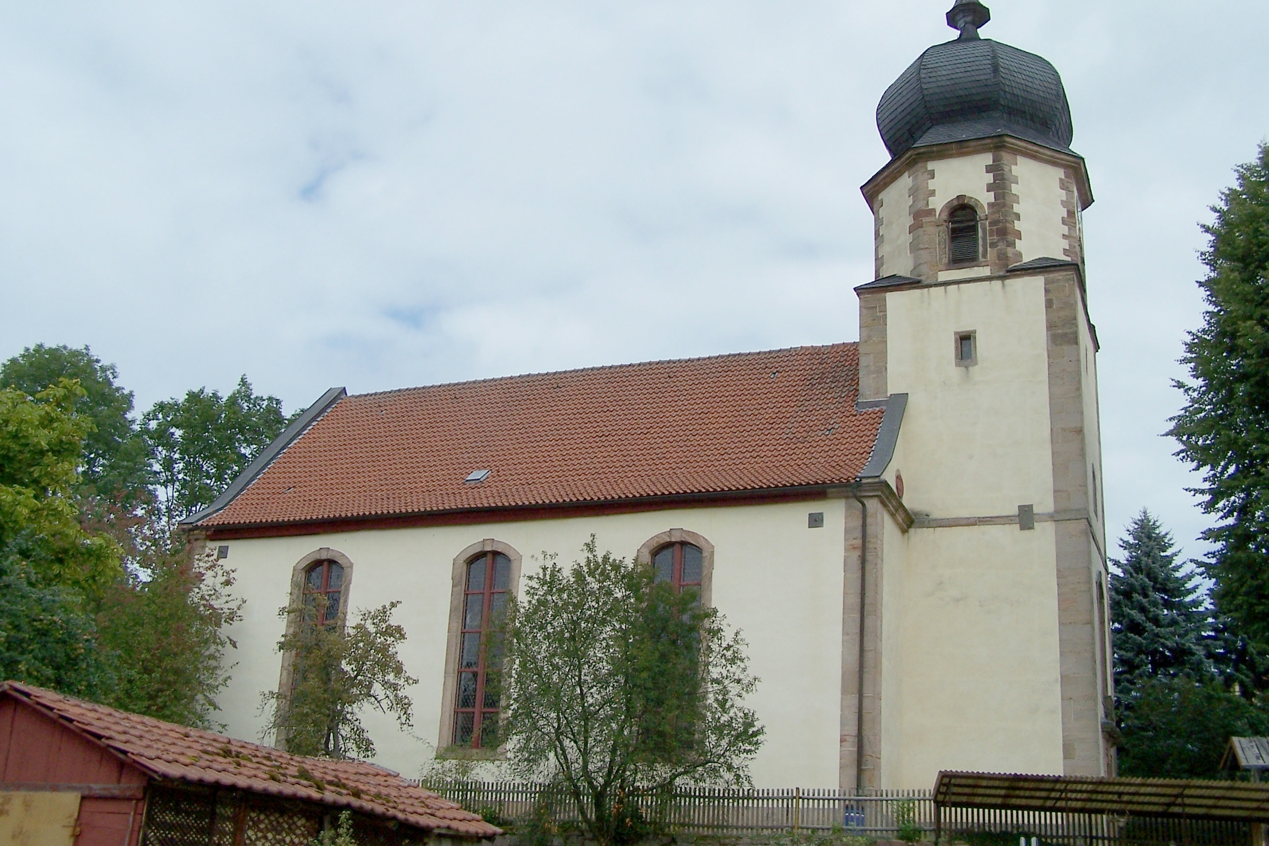 Ansichten und Details zur Ev. Kirche in Gehaus.